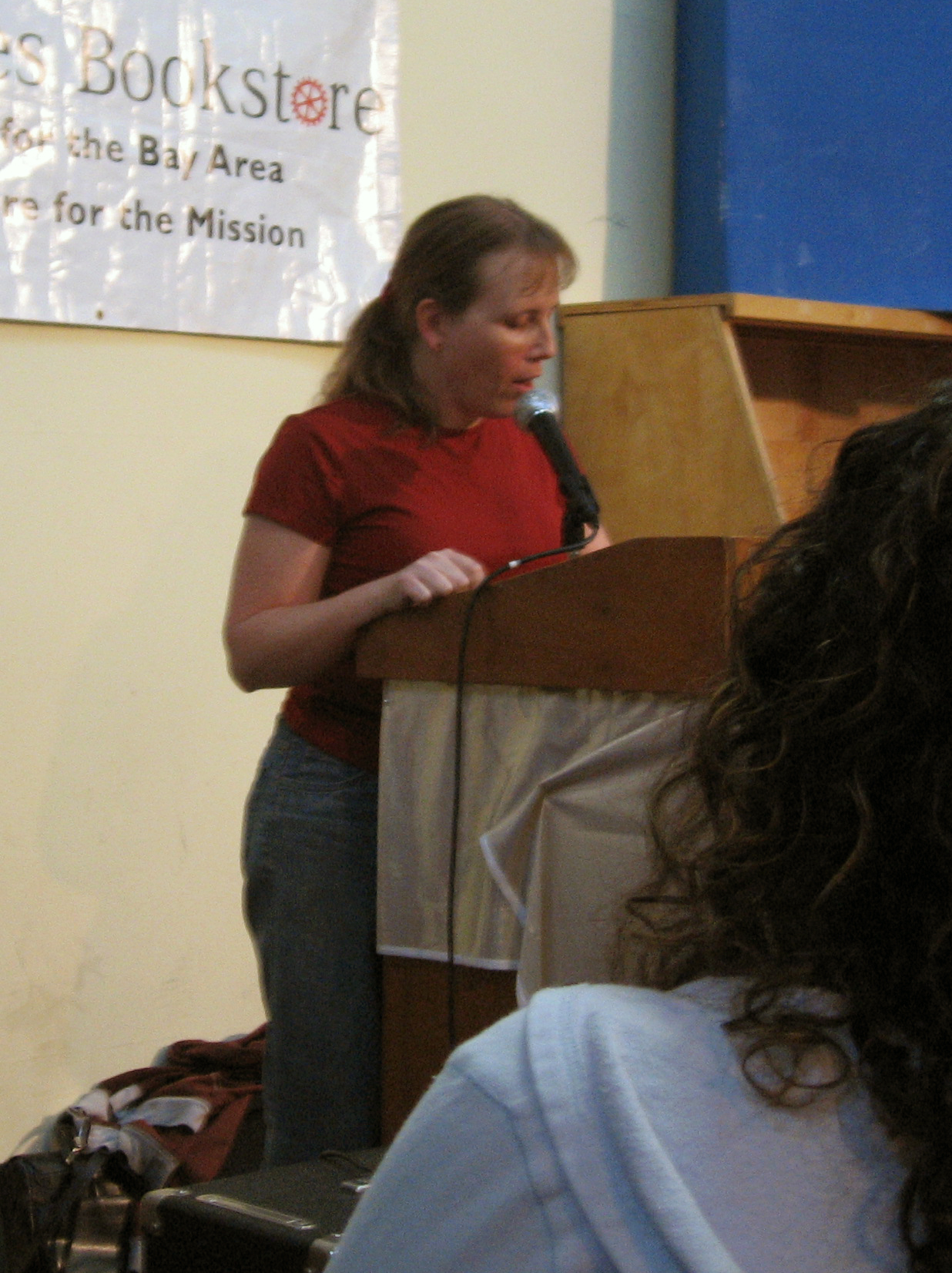 Julia Serano at Modern Times